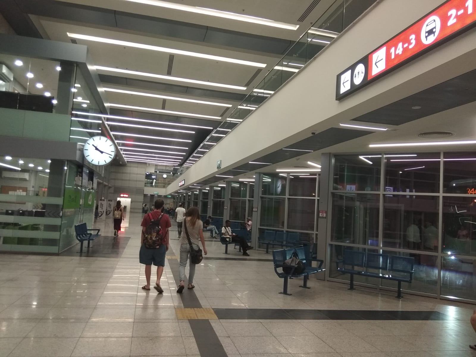 תחנת מרכזית המפרץ, אזור המתנה לאוטובוסים בין עירונים